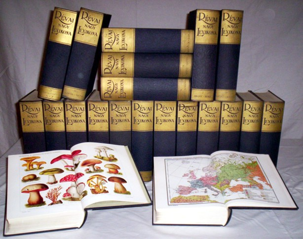 Révai nagy lexikonának hasonmás kiadása, eredeti kiadás 1911–1935